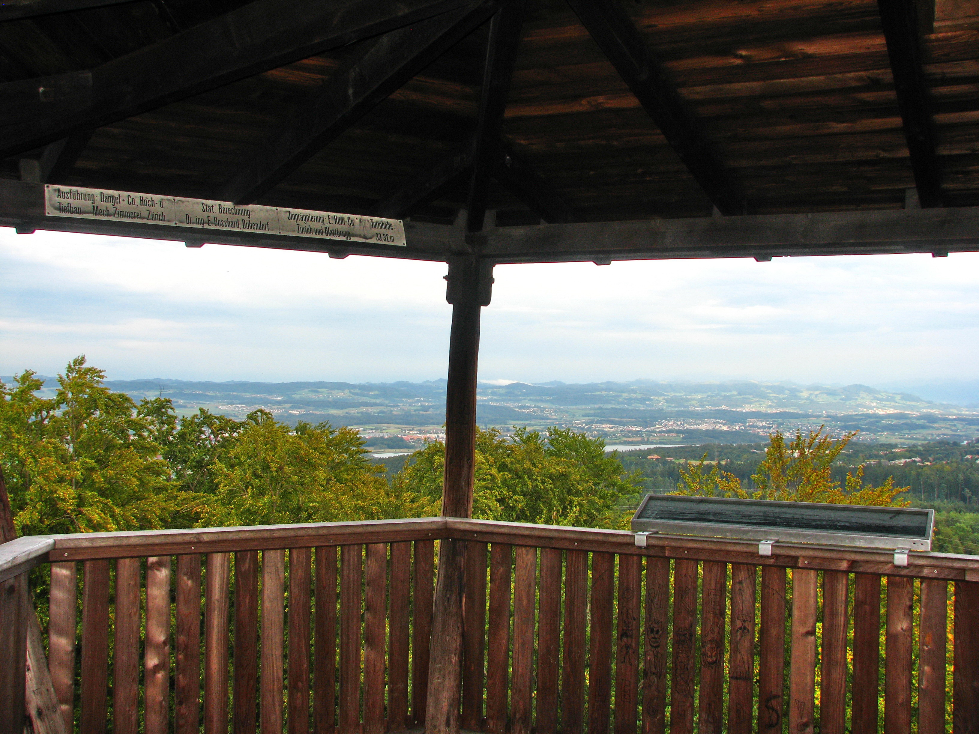 Loorenkopf tower on Adlisberg in Zürich-Witikon (Switzerland), Zürcher Oberland in the background.